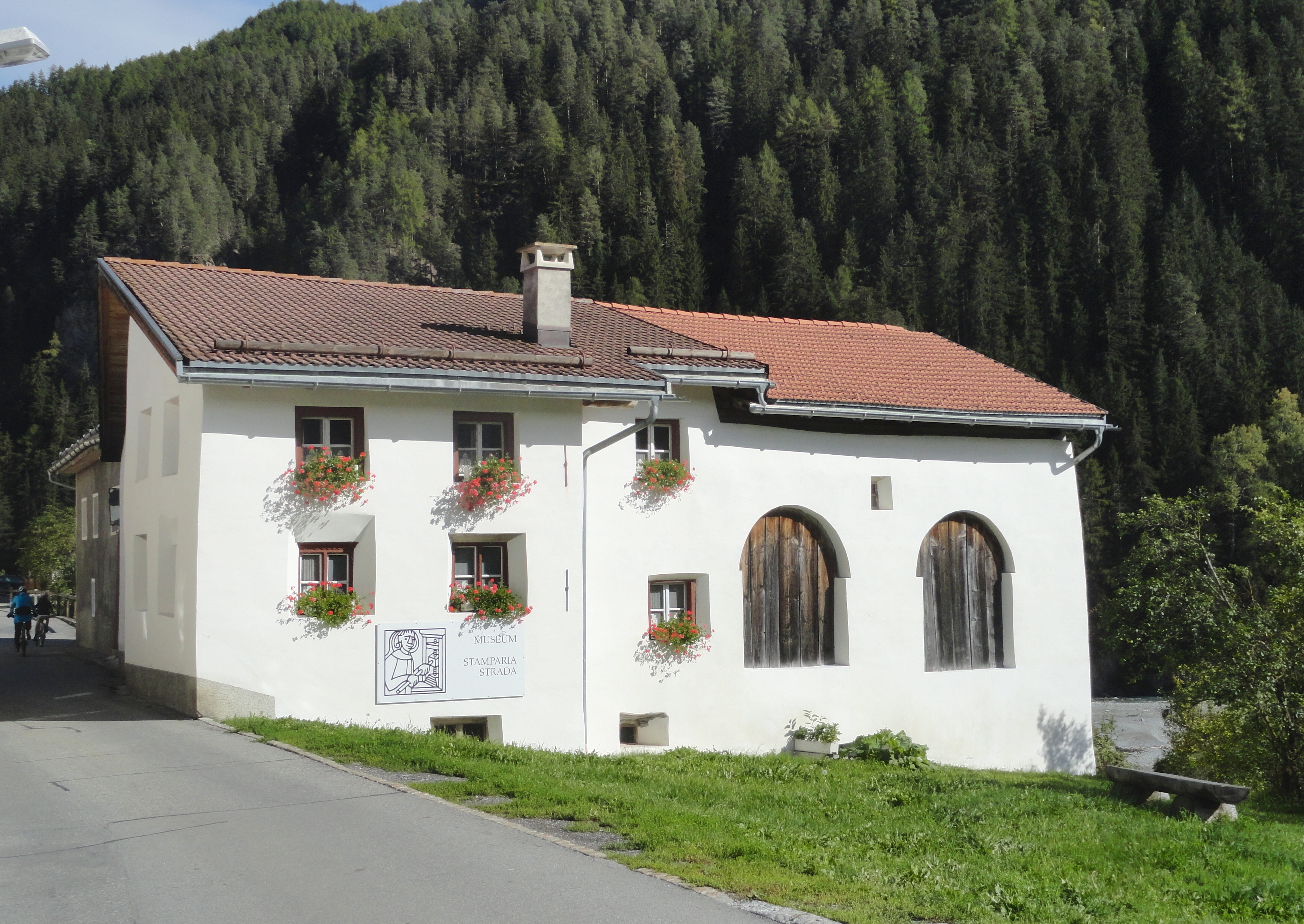 Museum Stamparia in Strada im Engadin (politische Gemeinde: Tschlin)